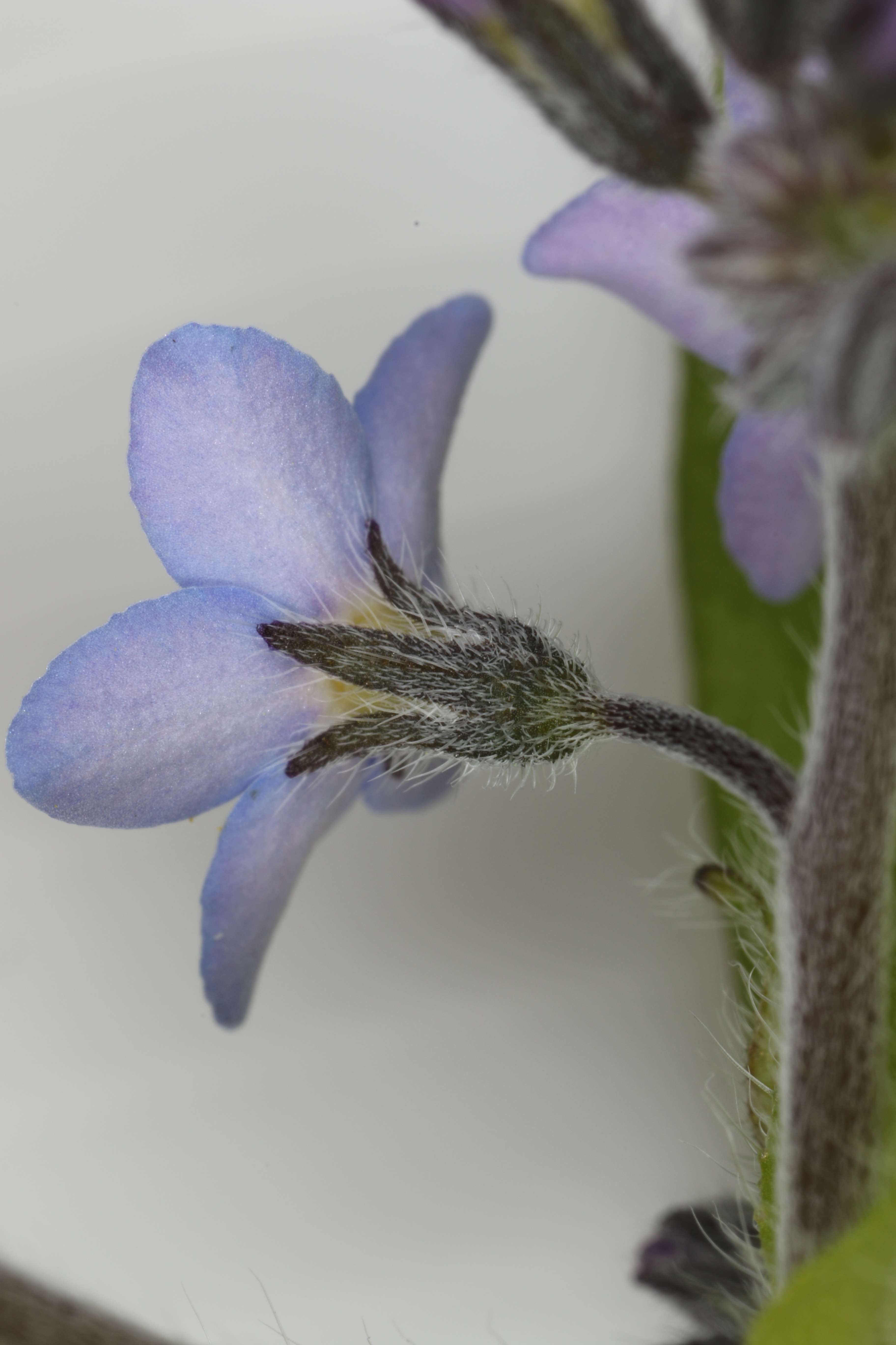 Myosotis arvensis (L.) Hill, Søborg, Denmark, 2 May 2016